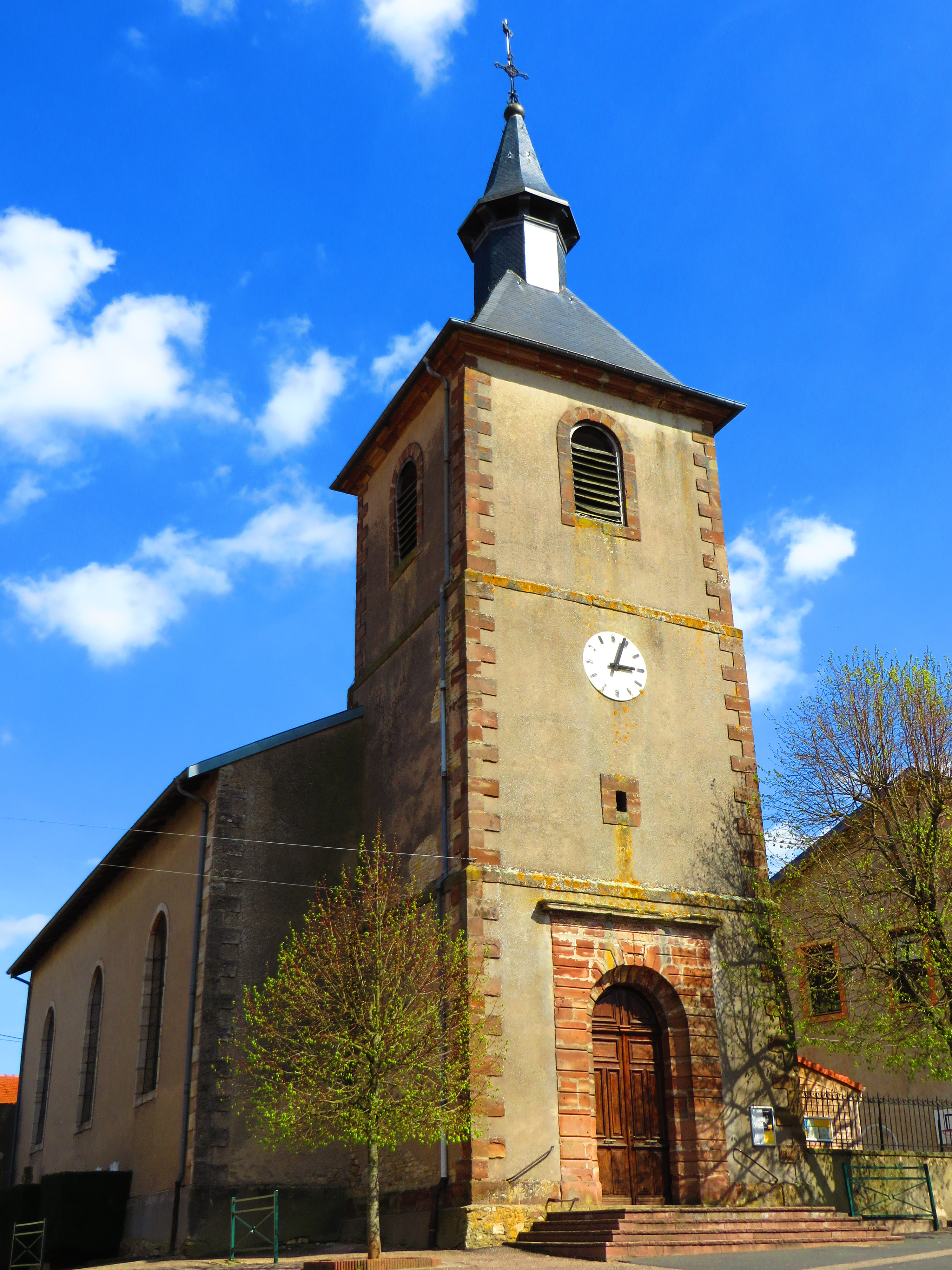 Crevic eglise